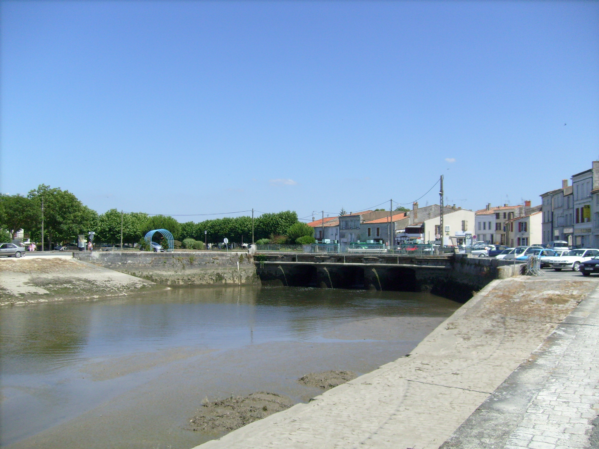 Port de Ribérou, Saujon